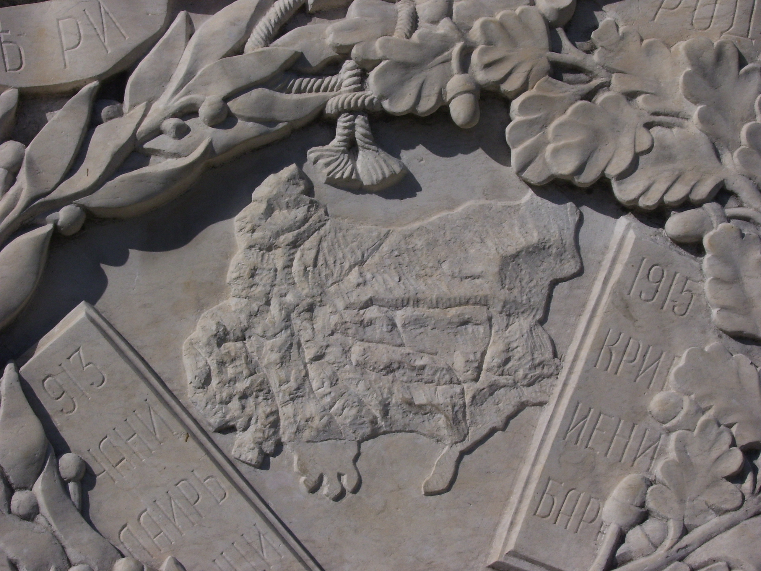 Карта на Велика България от войнишкия паметник в центъра на Кюстендил, България.